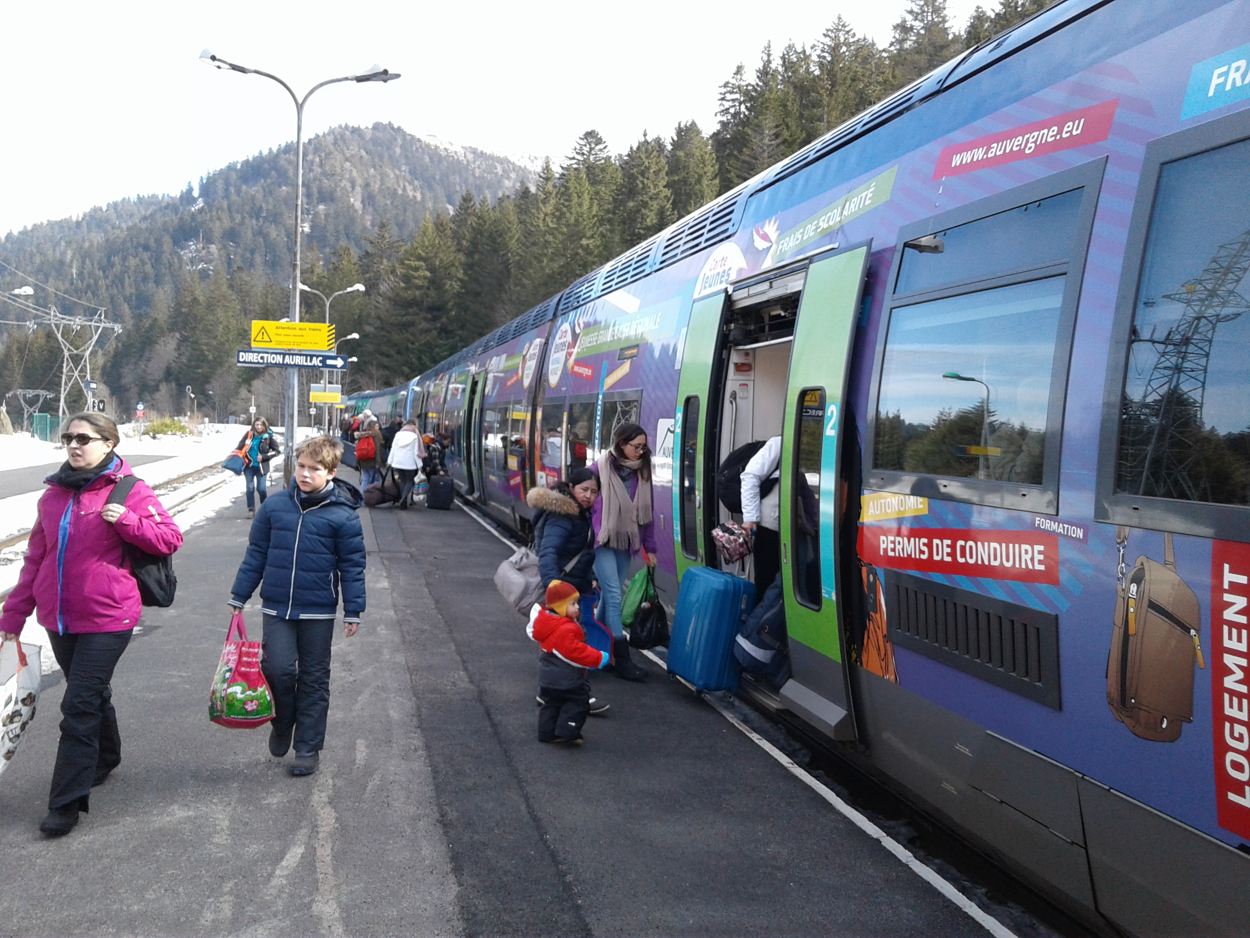 Un TER en gare du Lioran, dans le sens Clermont-Ferrand vers Aurillac.